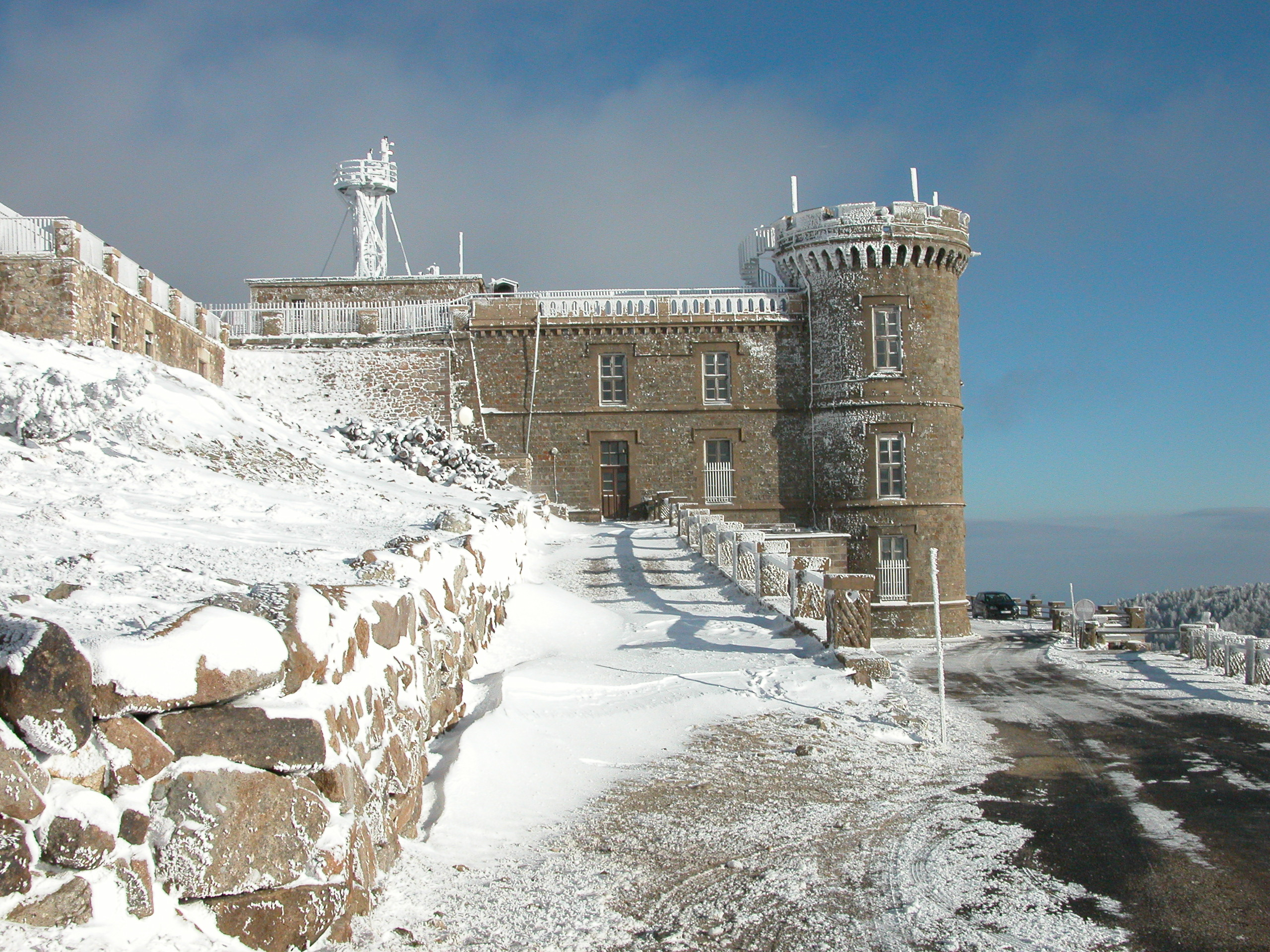 L'Observatoire météo du mont Aigoual (1567 m)